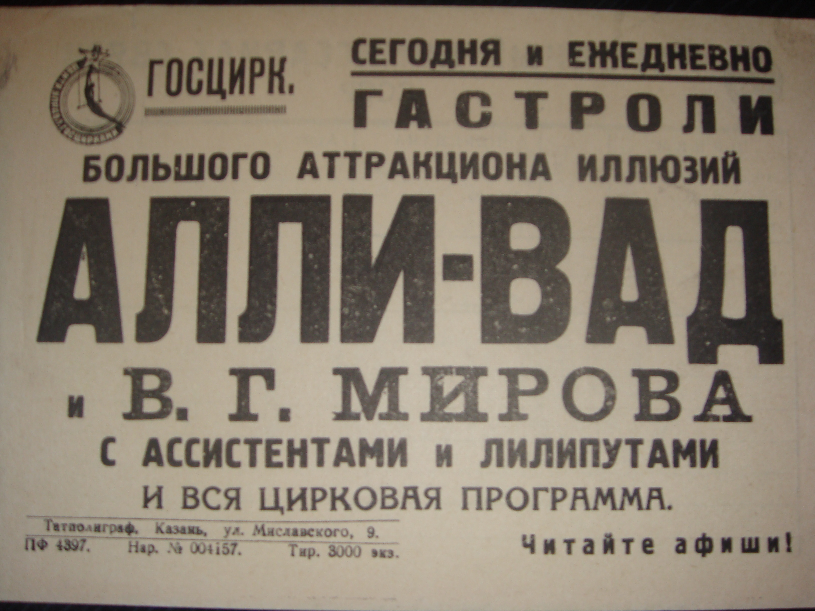 Афиша выступления А.А. Вадимова-Маркелова